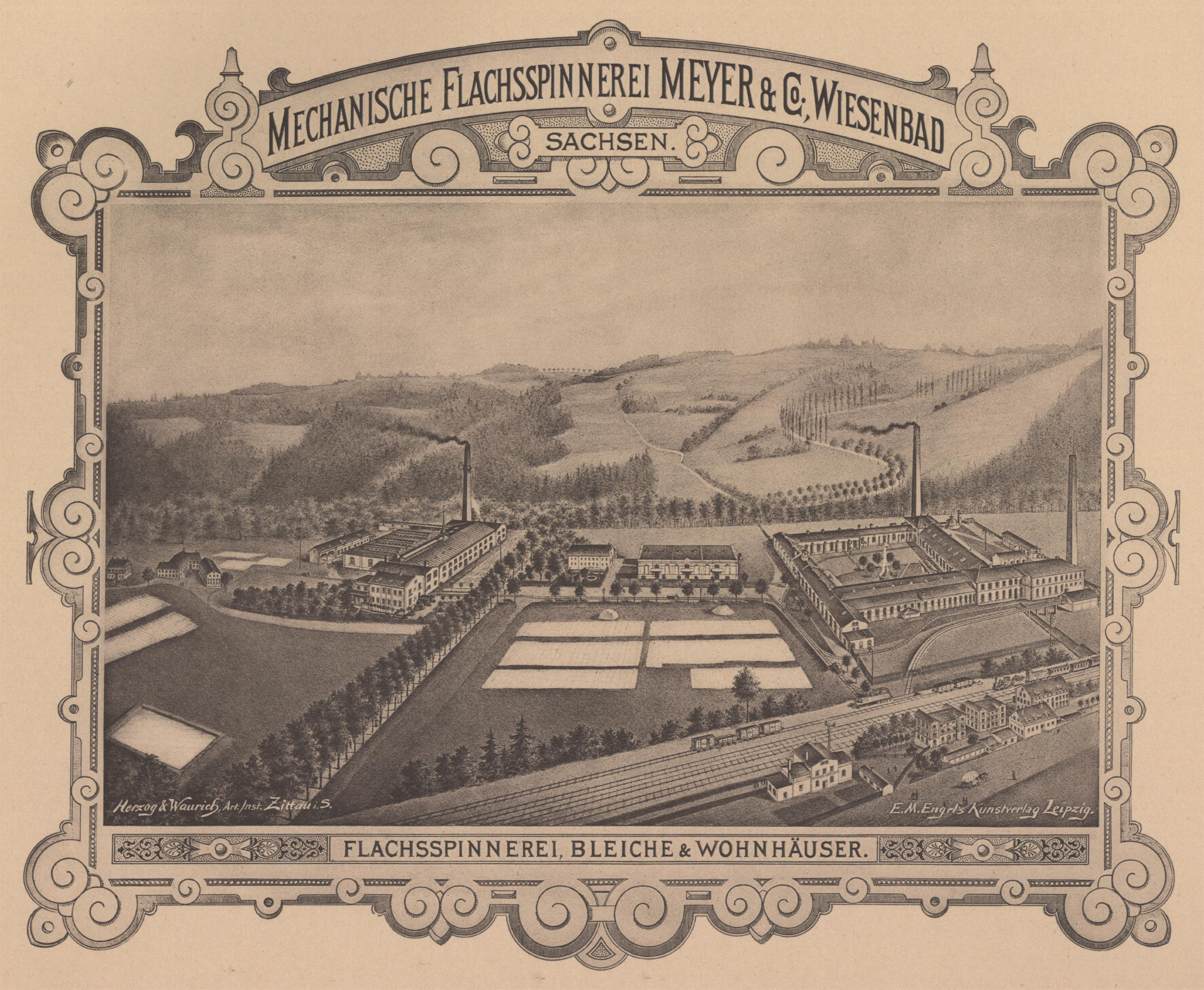 Mechanische Flachsspinnerei, Meyer & Comp., in Wiesenbad aus: Die Groß-Industrie des Königreichs Sachsen in Wort und Bild Erster Teil